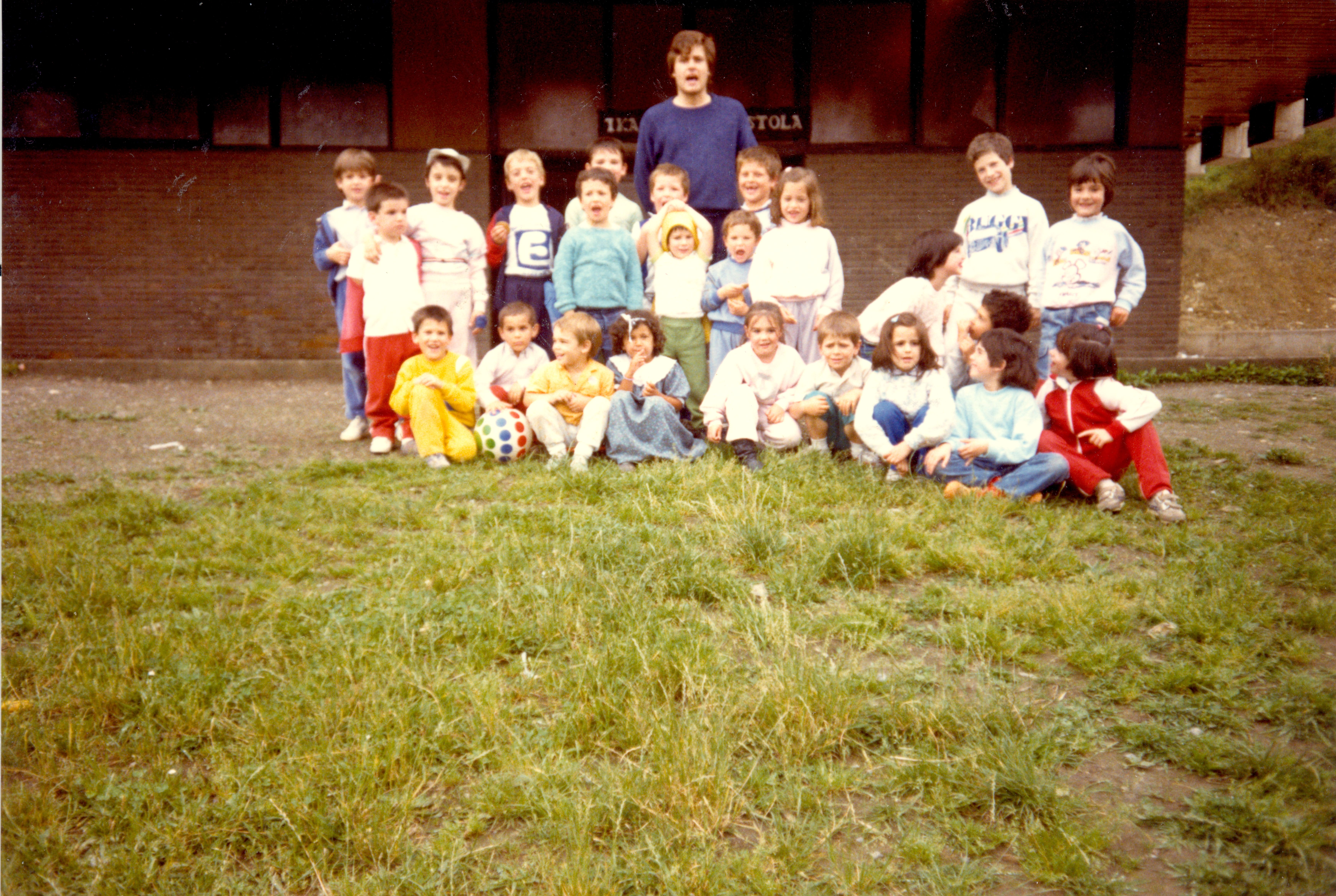 Ikastola Ikasbide (San Sebastián) cuando estaba situado en el Txuri Urdin